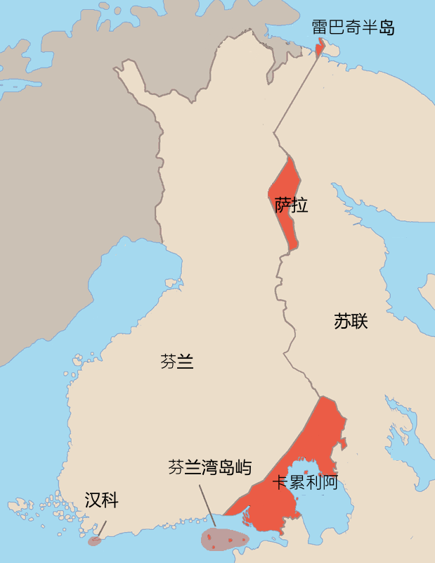 冬季戰爭後芬蘭割給蘇聯的領土